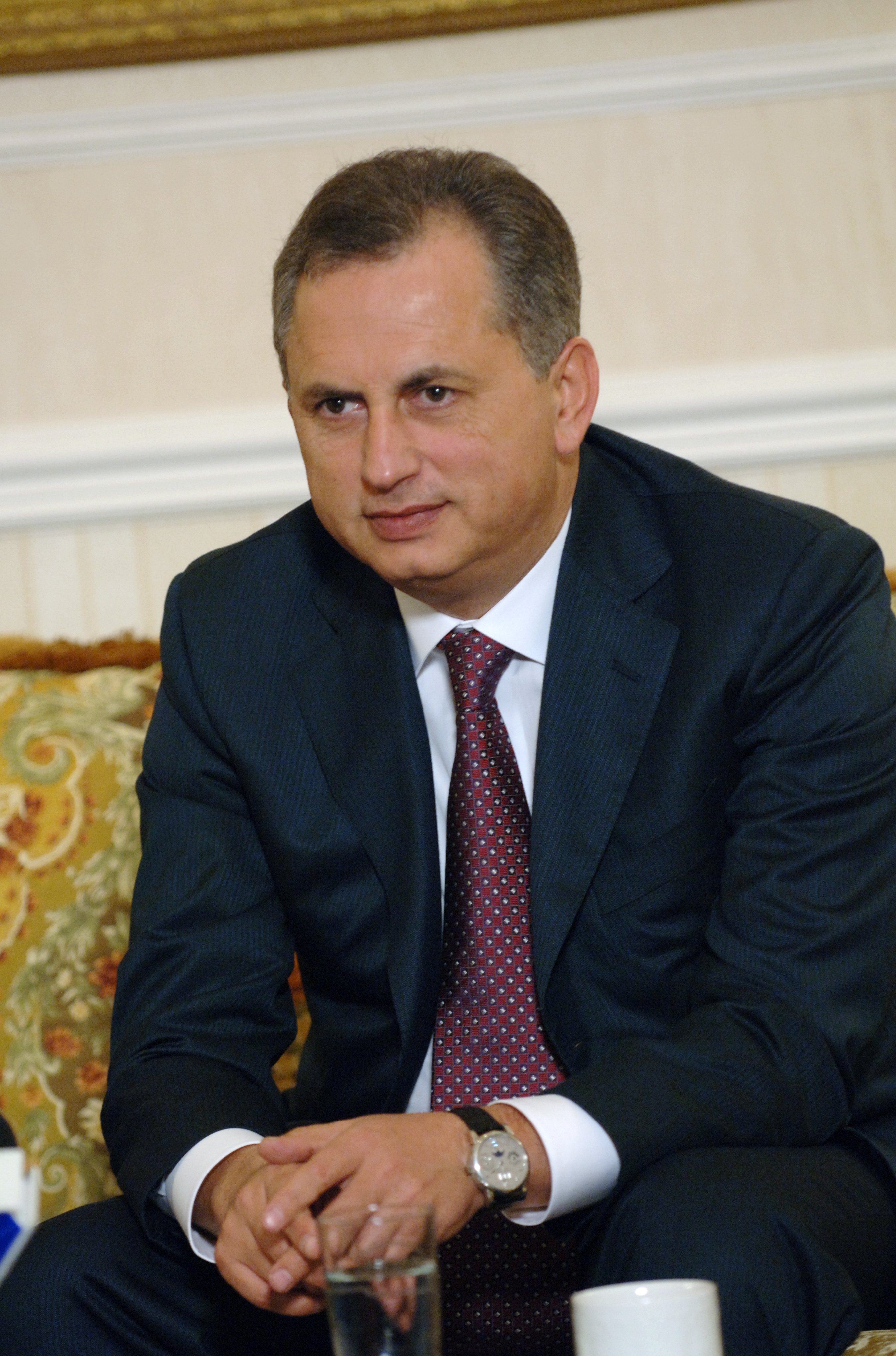 Віце-прем'єр-міністр України - Міністр інфраструктури України